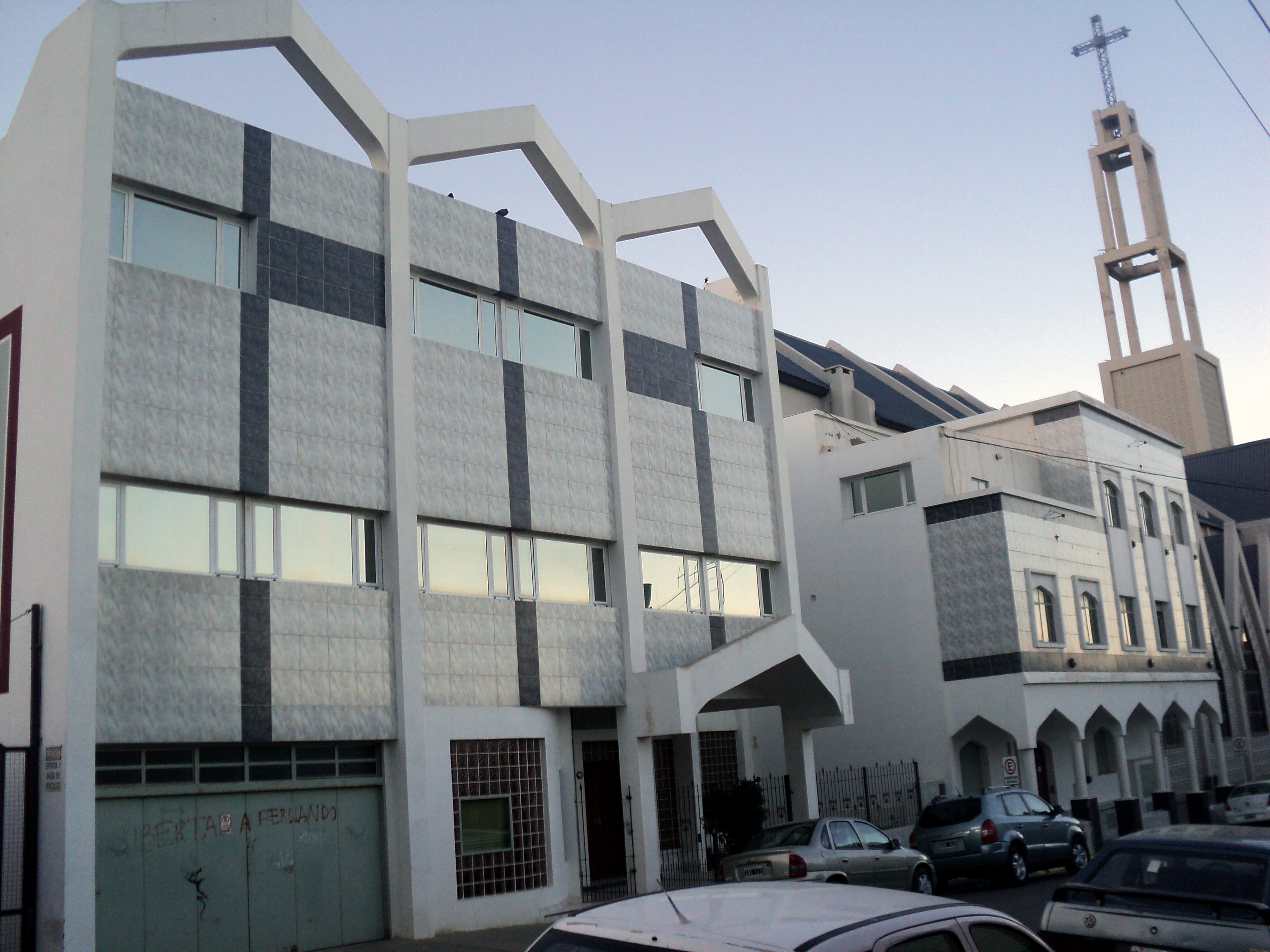 El obispado de la diosesis de Comodoro Rivadavia atras de la catedral